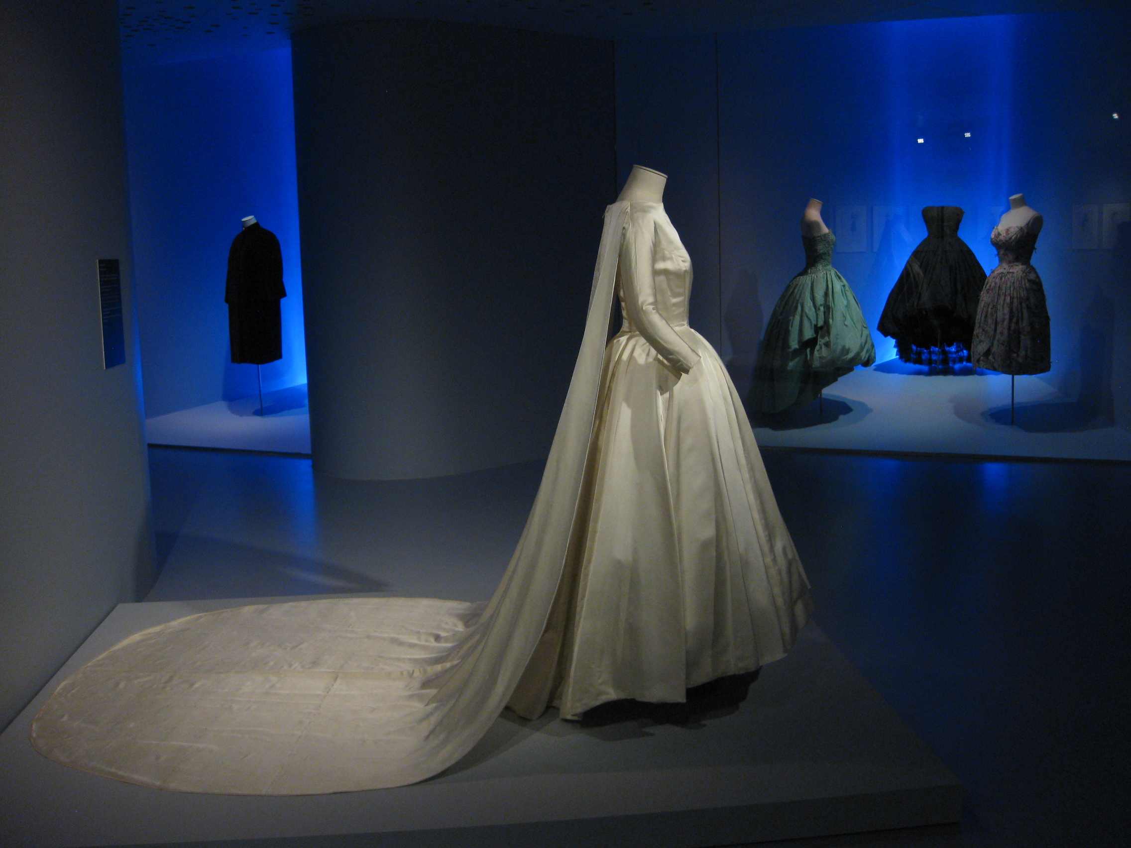 Exposició Balenciaga y la alta costura en Barcelona, proximidades y distancias. Col·lecció tèxtil Antoni de Montpalau